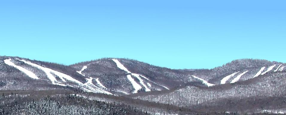 Centre de ski à Stoneham Québec Canada